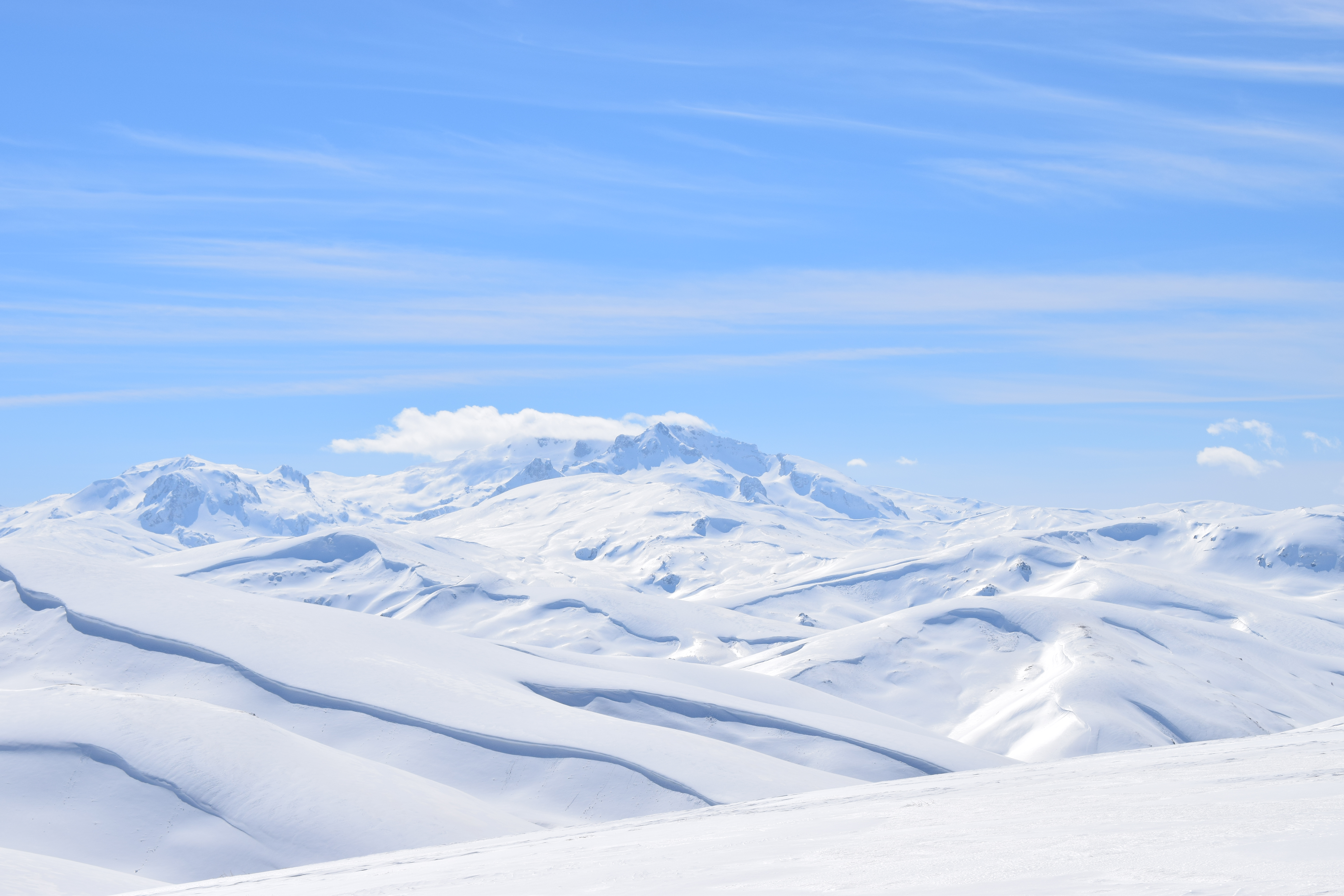 Korab-Koritnik, Diber, Kukes